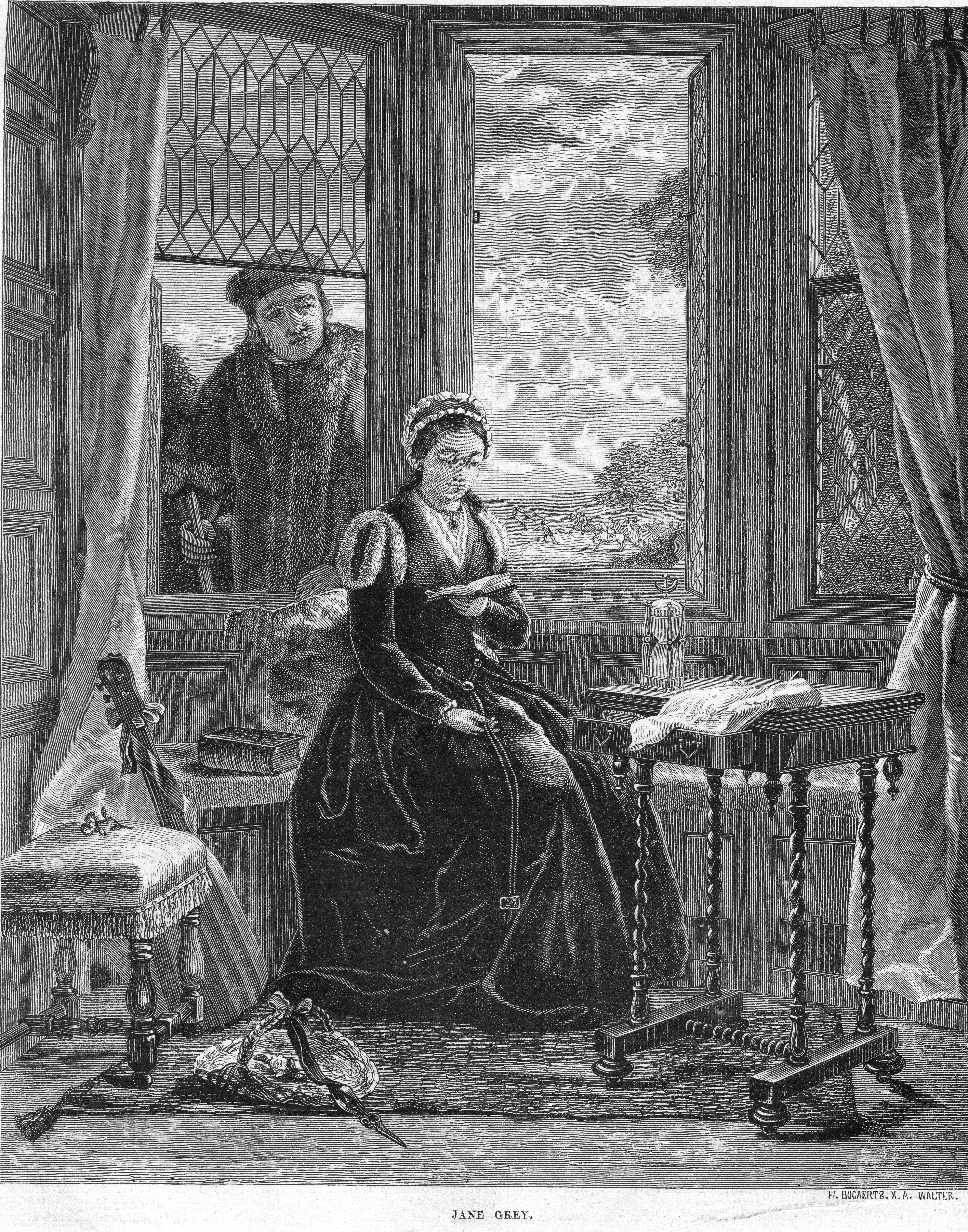 Kath. Illustratie 1869-1870 nr 5 p.36 gravure Jane Grey. Op de achtergrond haar voogd Roger Ascham